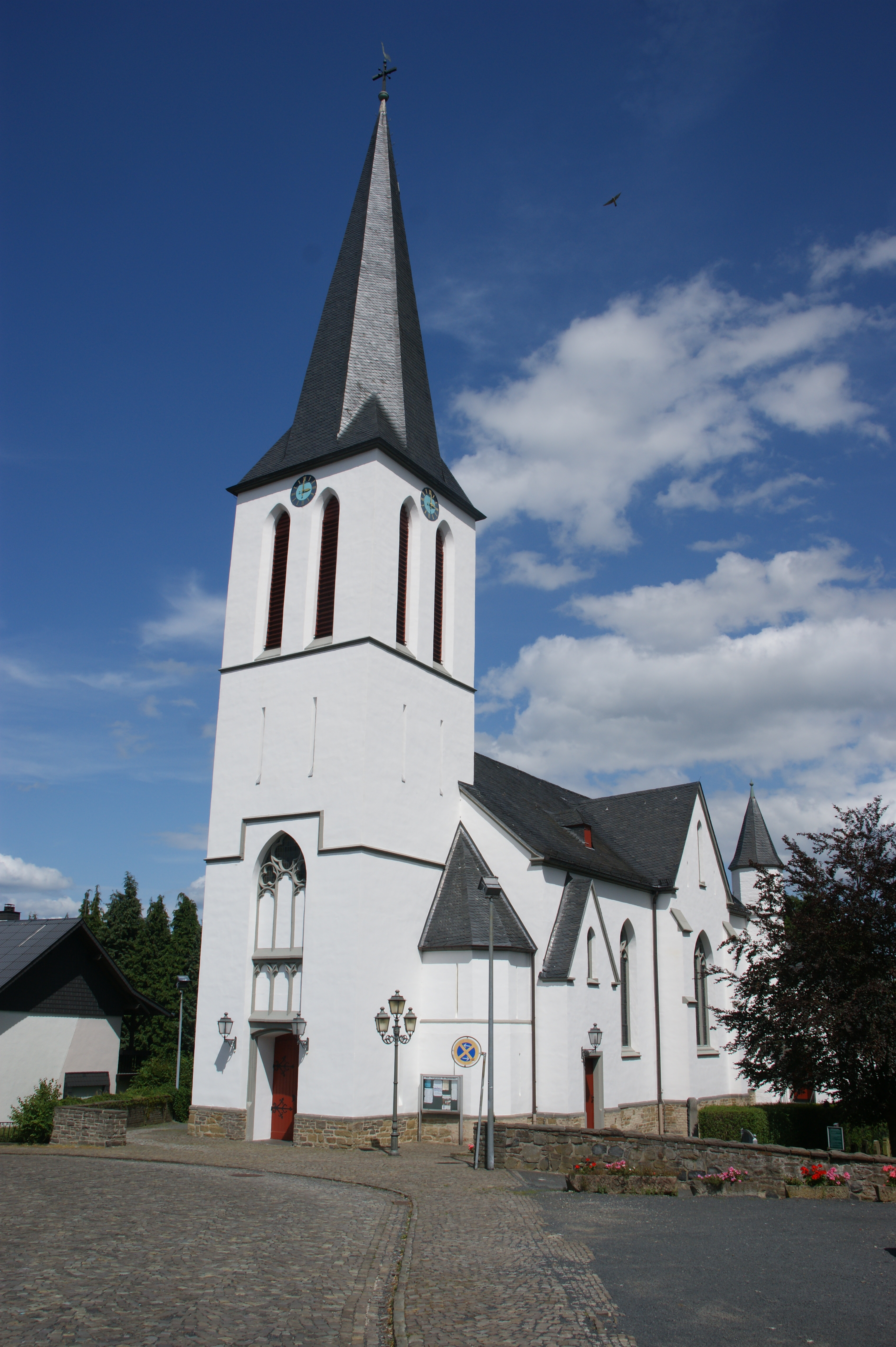 Katholische Pfarrkirche St. Bartholomäus in Windhagen